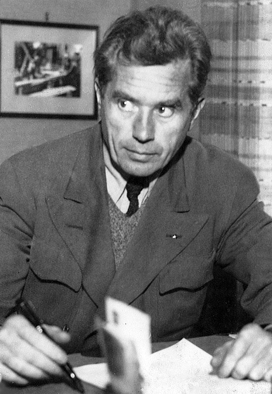 portrett, mann, langrennsløper, skifabrikant, sittende halvfigur ved skrivebord.